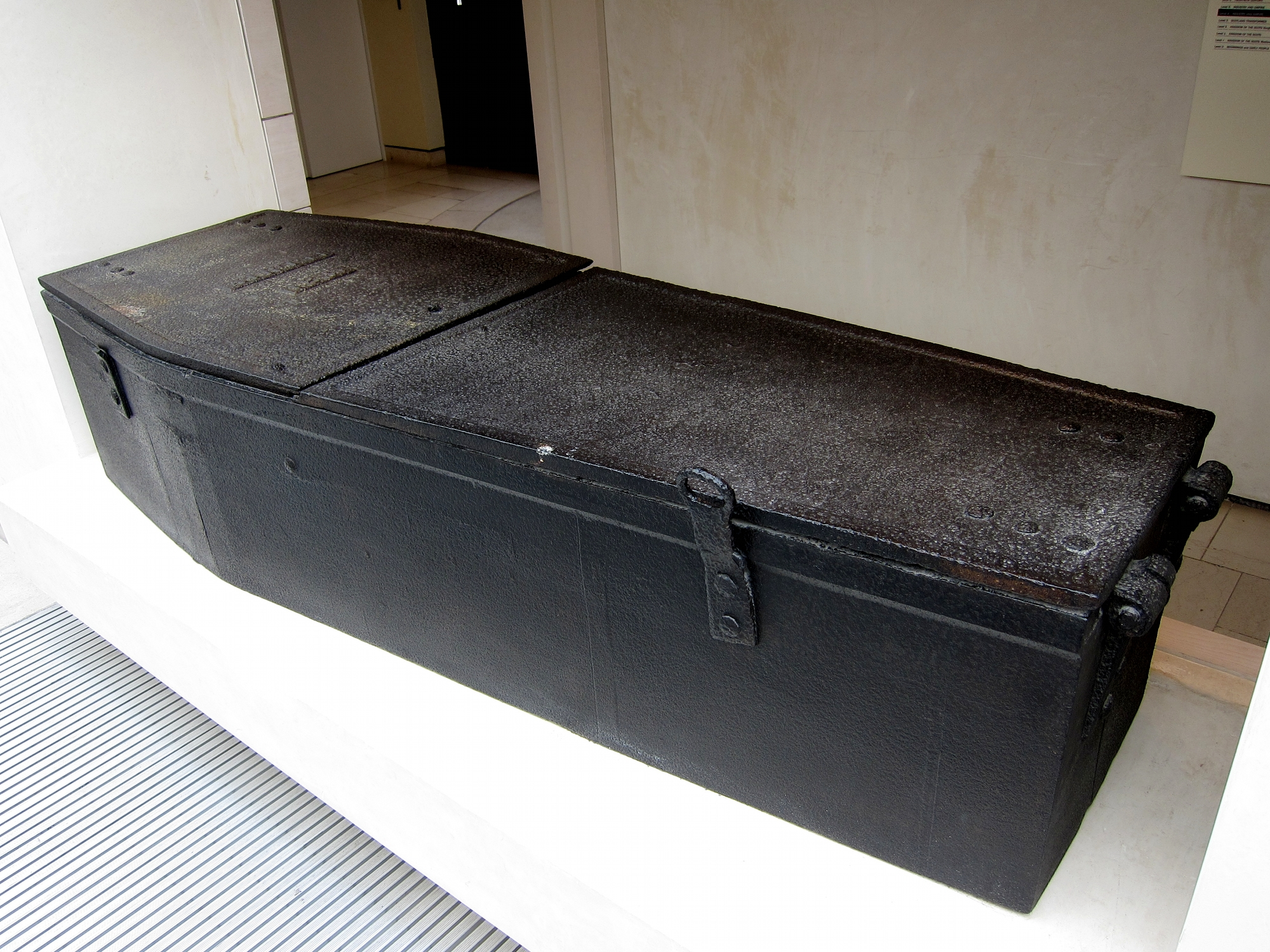 Coffre de protection de cercueils contre les voleurs de cadavres (1831) au Museum of Scotland d'Edimbourg.